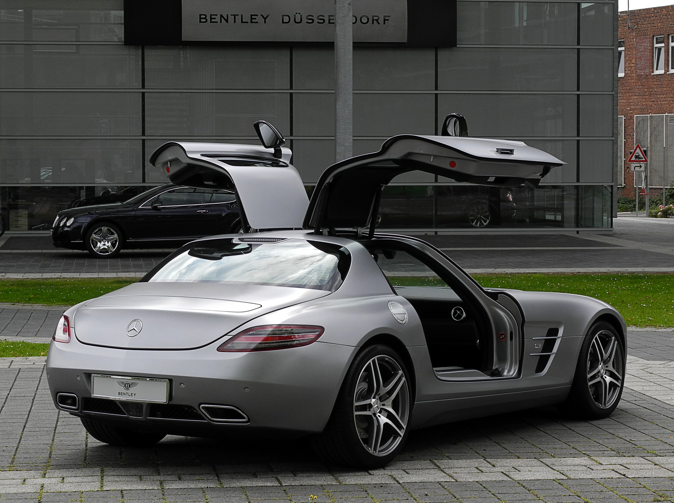 Mercedes-Benz SLS AMG (C 197)